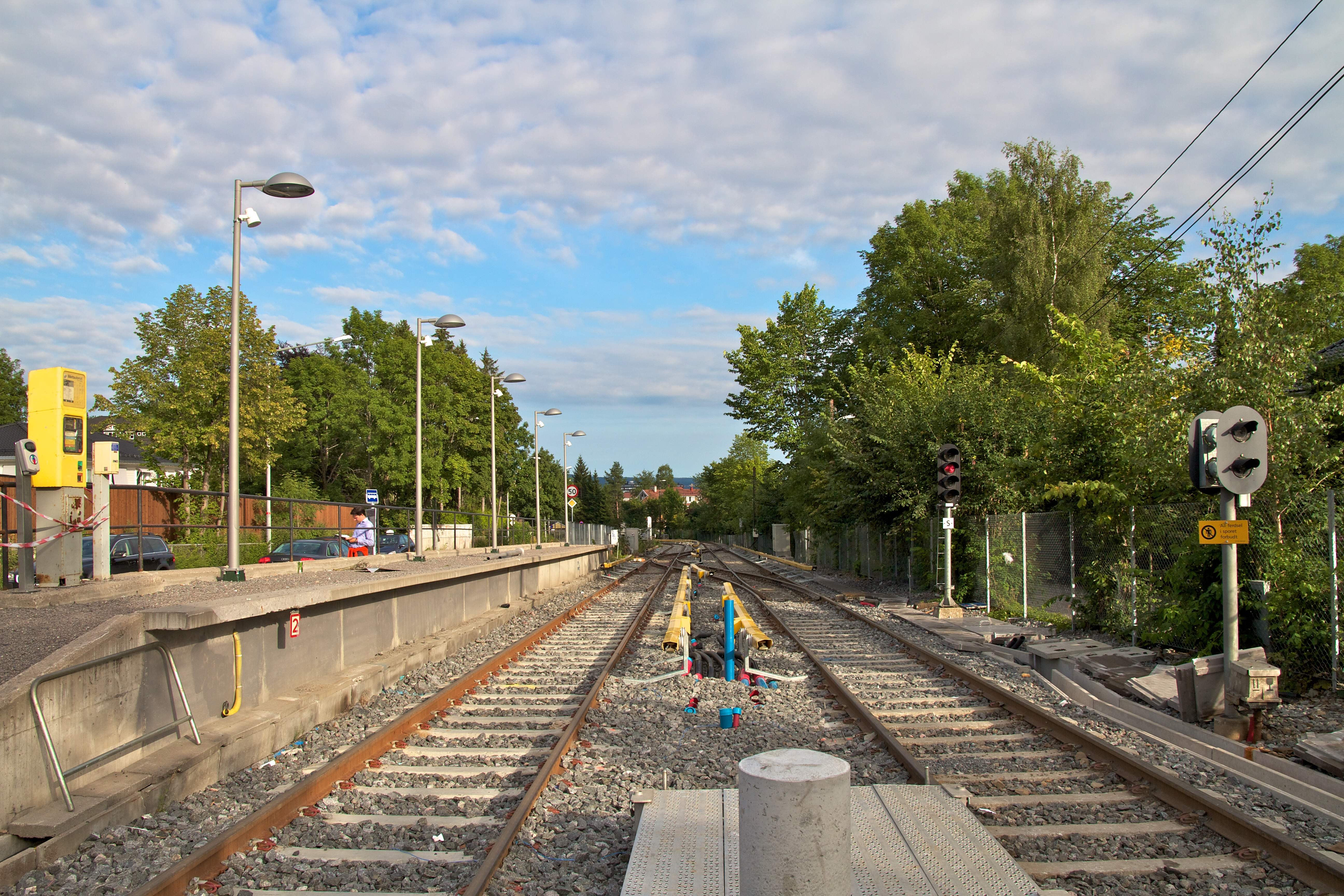 Ris stasjon på Holmenkollbanen.